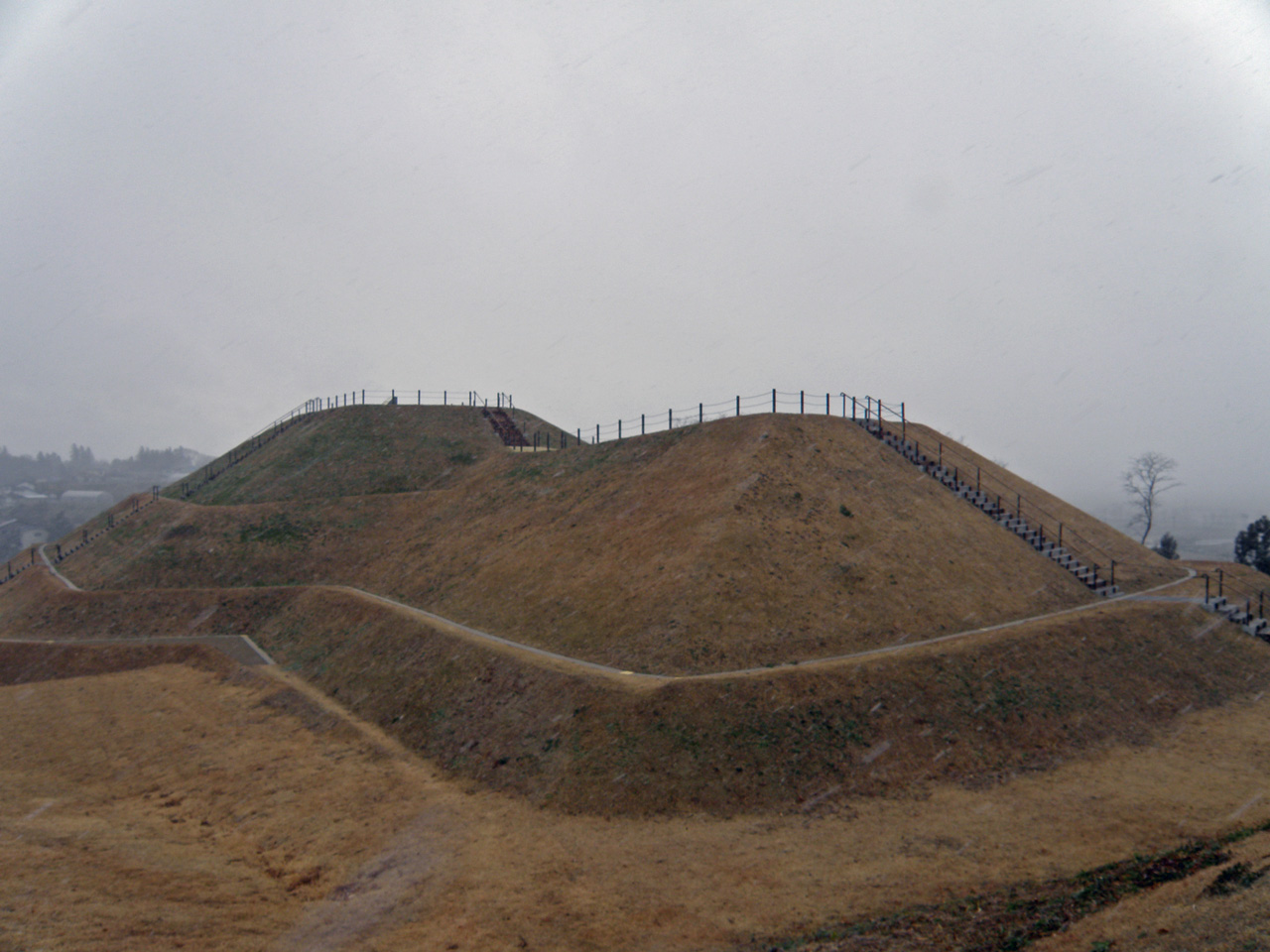 大安場古墳群1号墳（福島県郡山市）Ōyasuba Kofun, Kōriyama, Fukushima, Japan